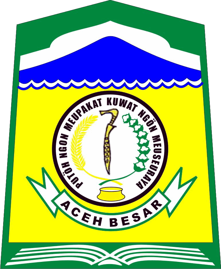 Lambang Kabupaten Aceh Besar, Aceh, Indonesia